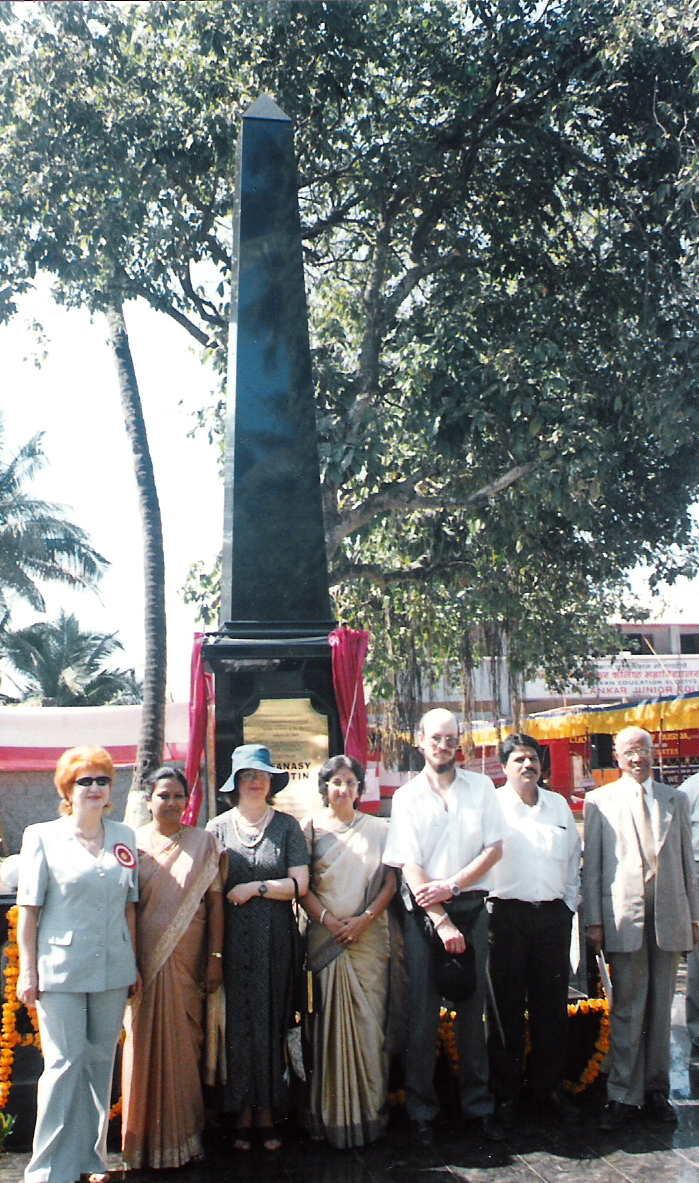 Открытие памятника Афанасию Никитину в Индии